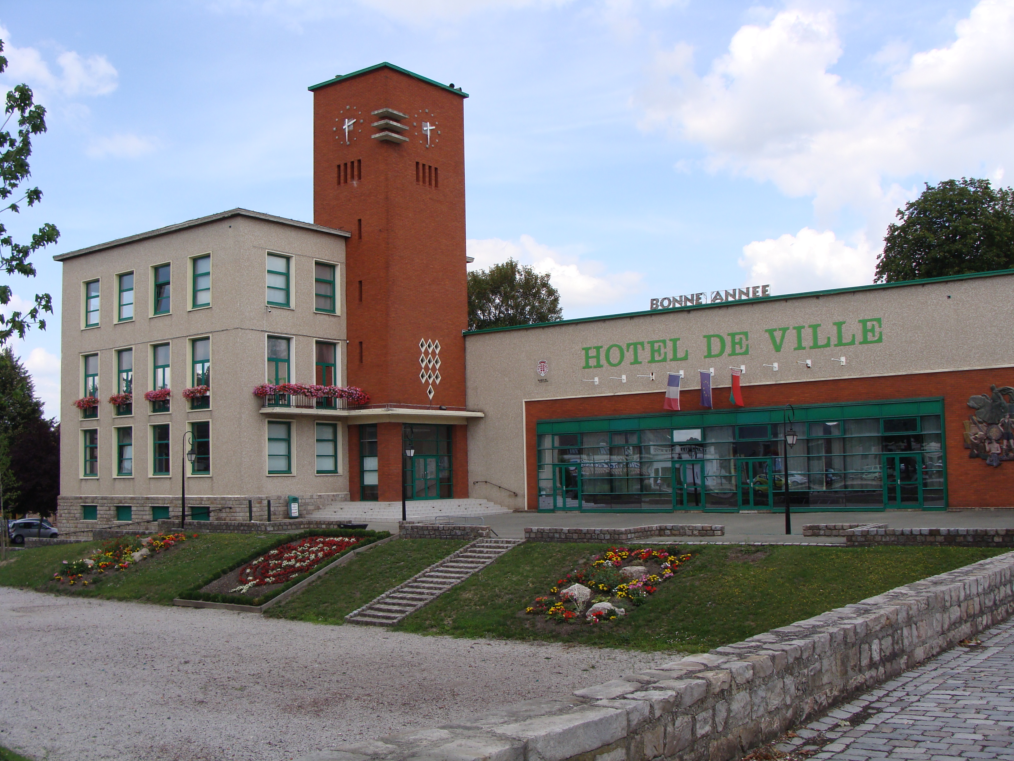 Lallaing - Mairie -Nord de la France